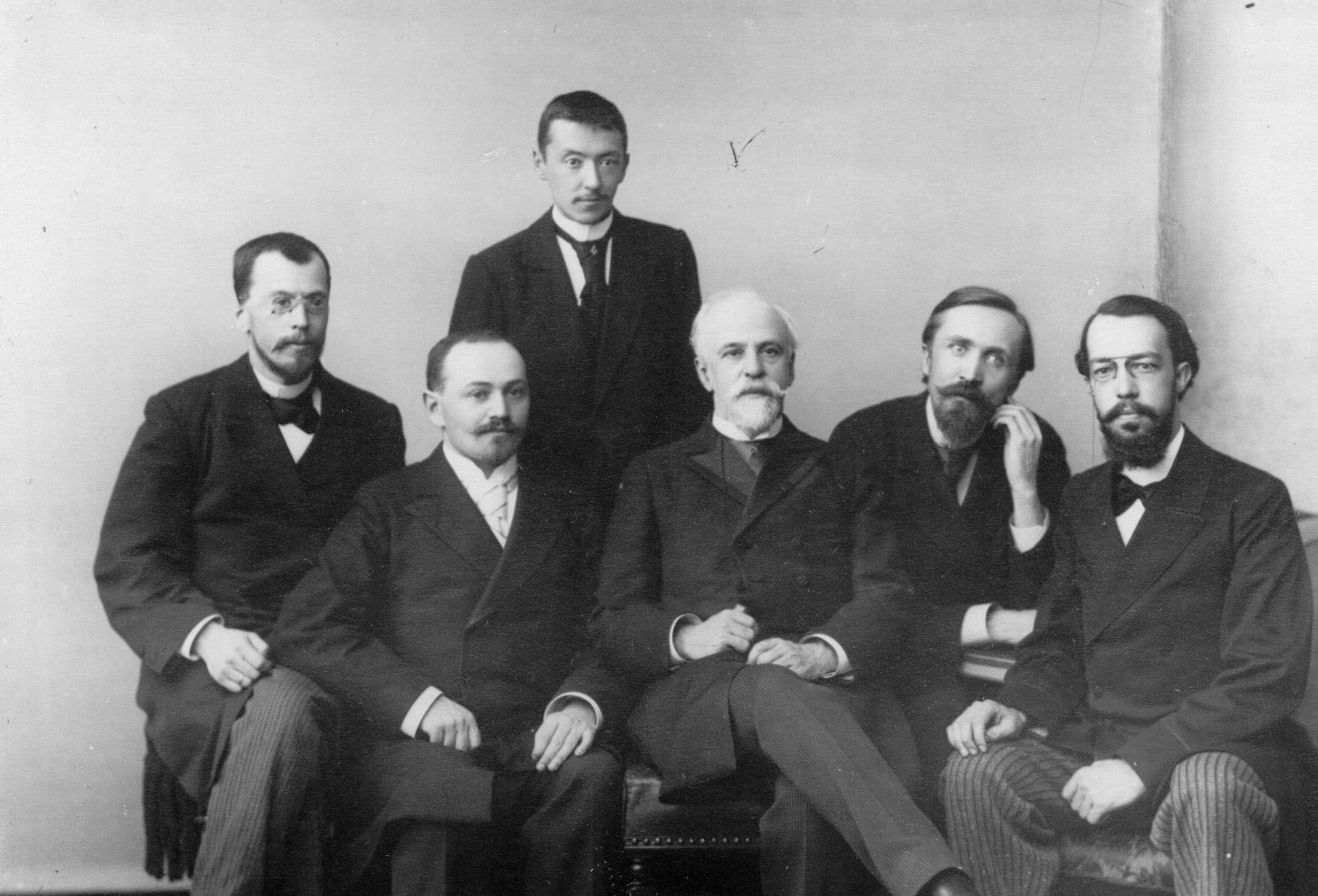 Преподаватель консерватории Николай Феопемптович Соловьев со своим классом